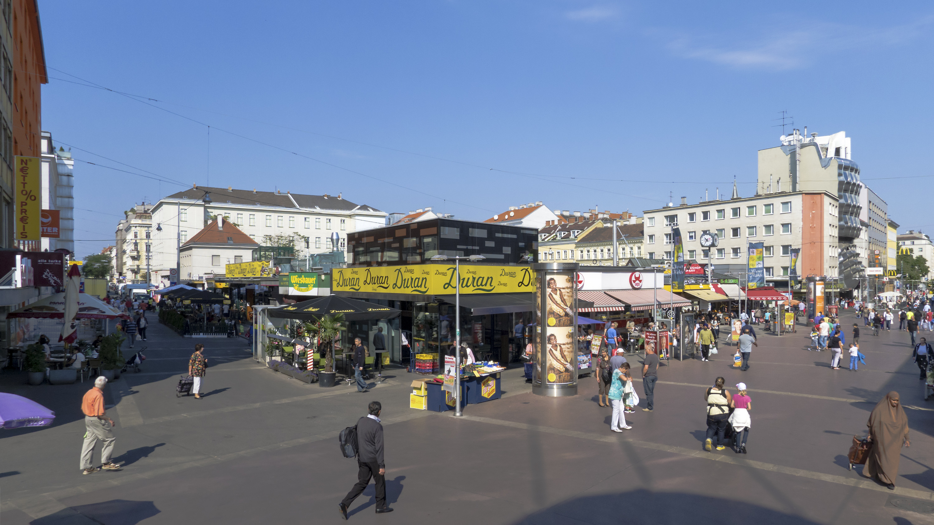 Viktor-Adler-Platz in Wien 10 bei der Favoritenstraße 103 Richtung Nordwesten